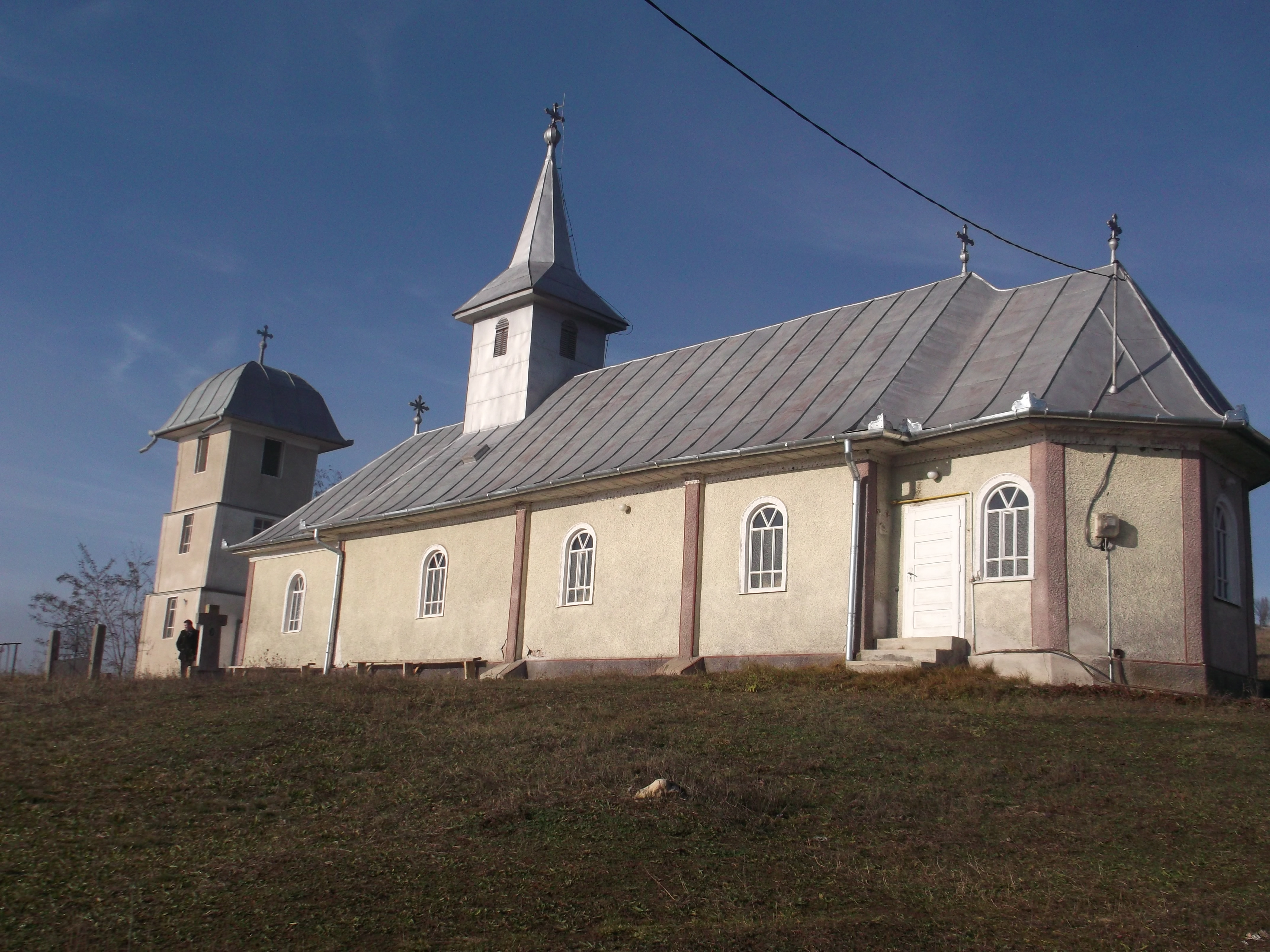 Vechea biserica din Soporu de Campie